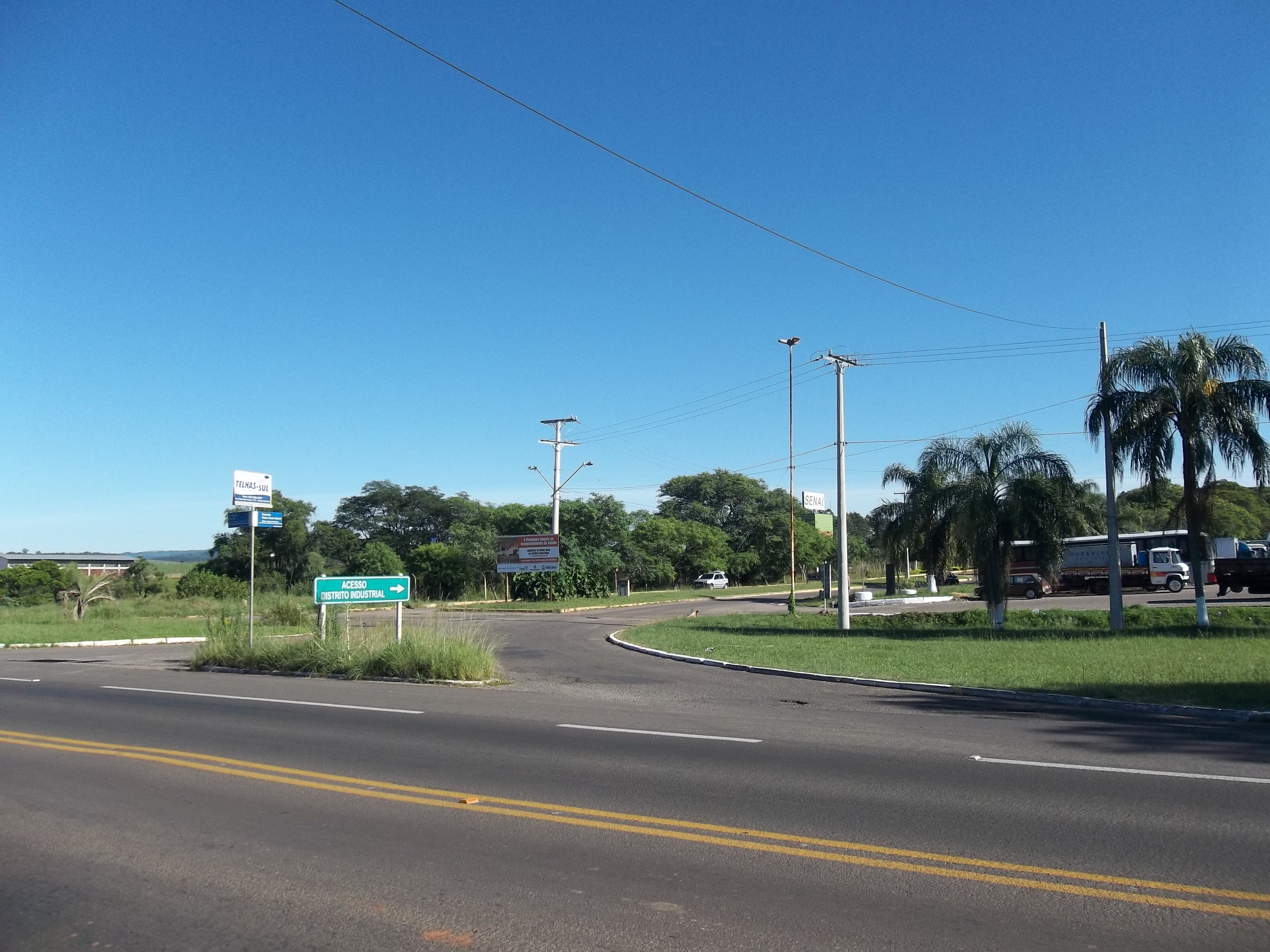 Acesso ao Distrito Industrial de Santa Maria. Rio Grande do Sul. Brasil.